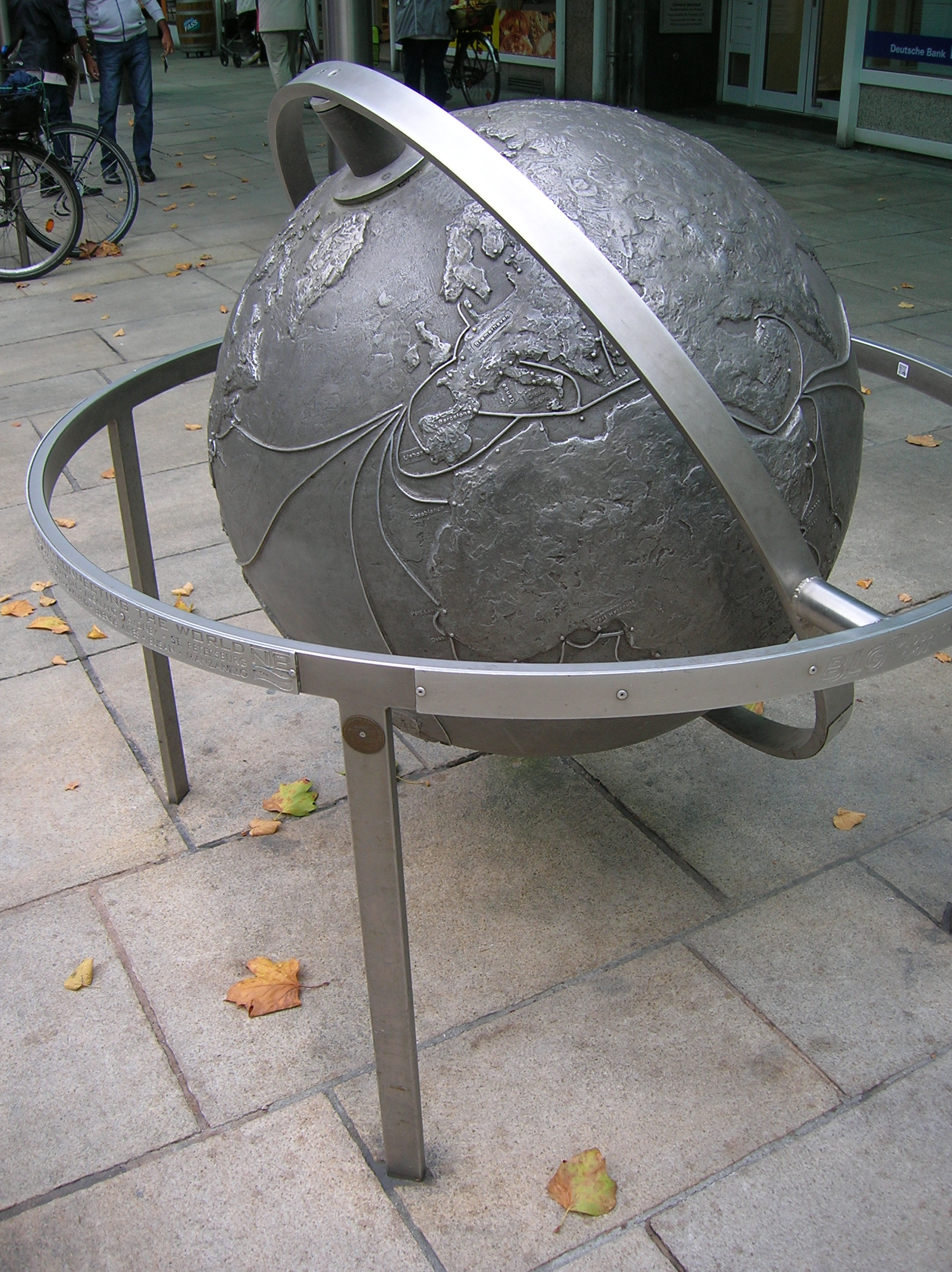 Kardanische Weltkugel mit den großen Schiffahrtsrouten von Bremerhaven, Bürgermeister-Smidt-Str. 7, gestiftet von der BLG Bremerlagerhaus Gesellschaft